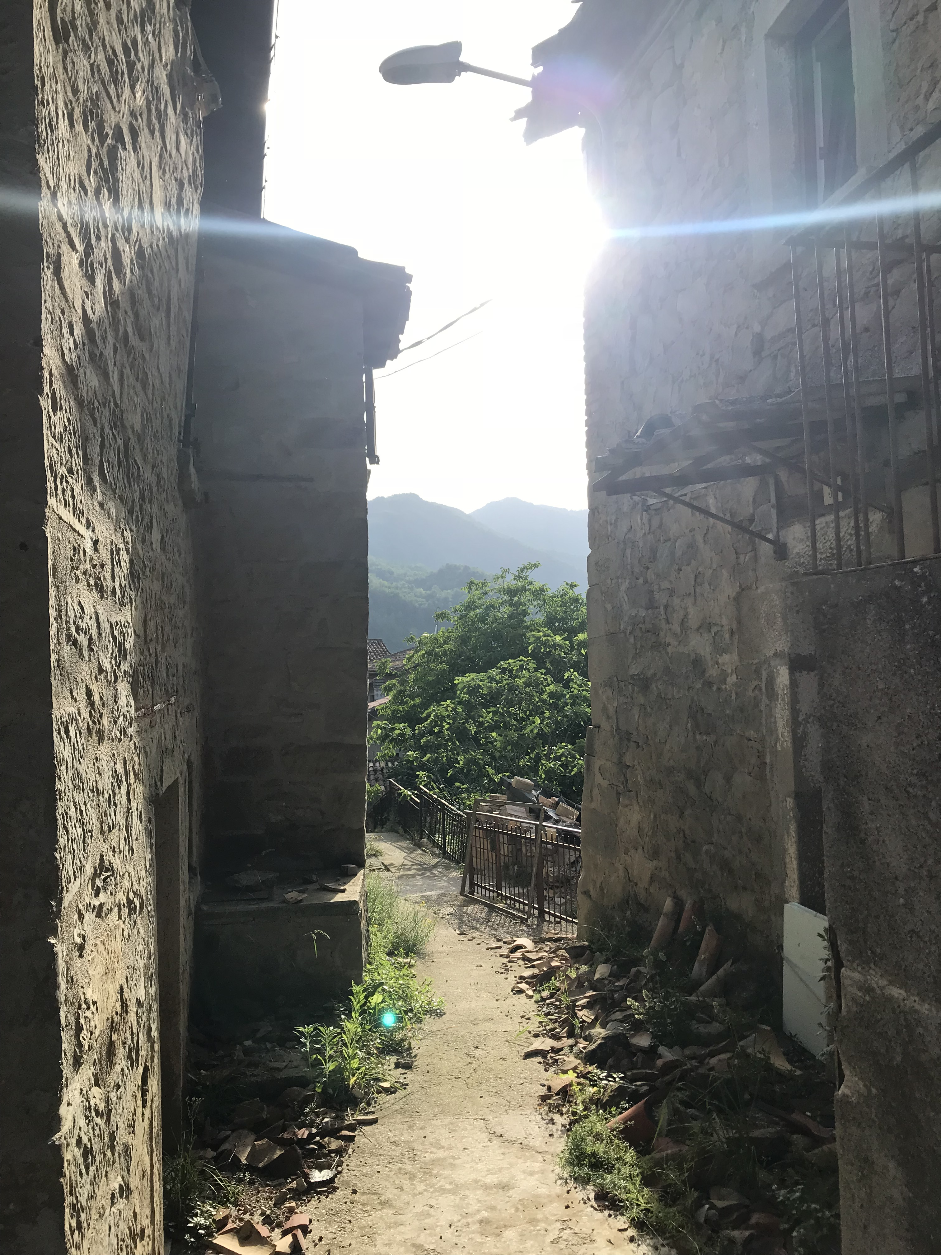 scorcioi